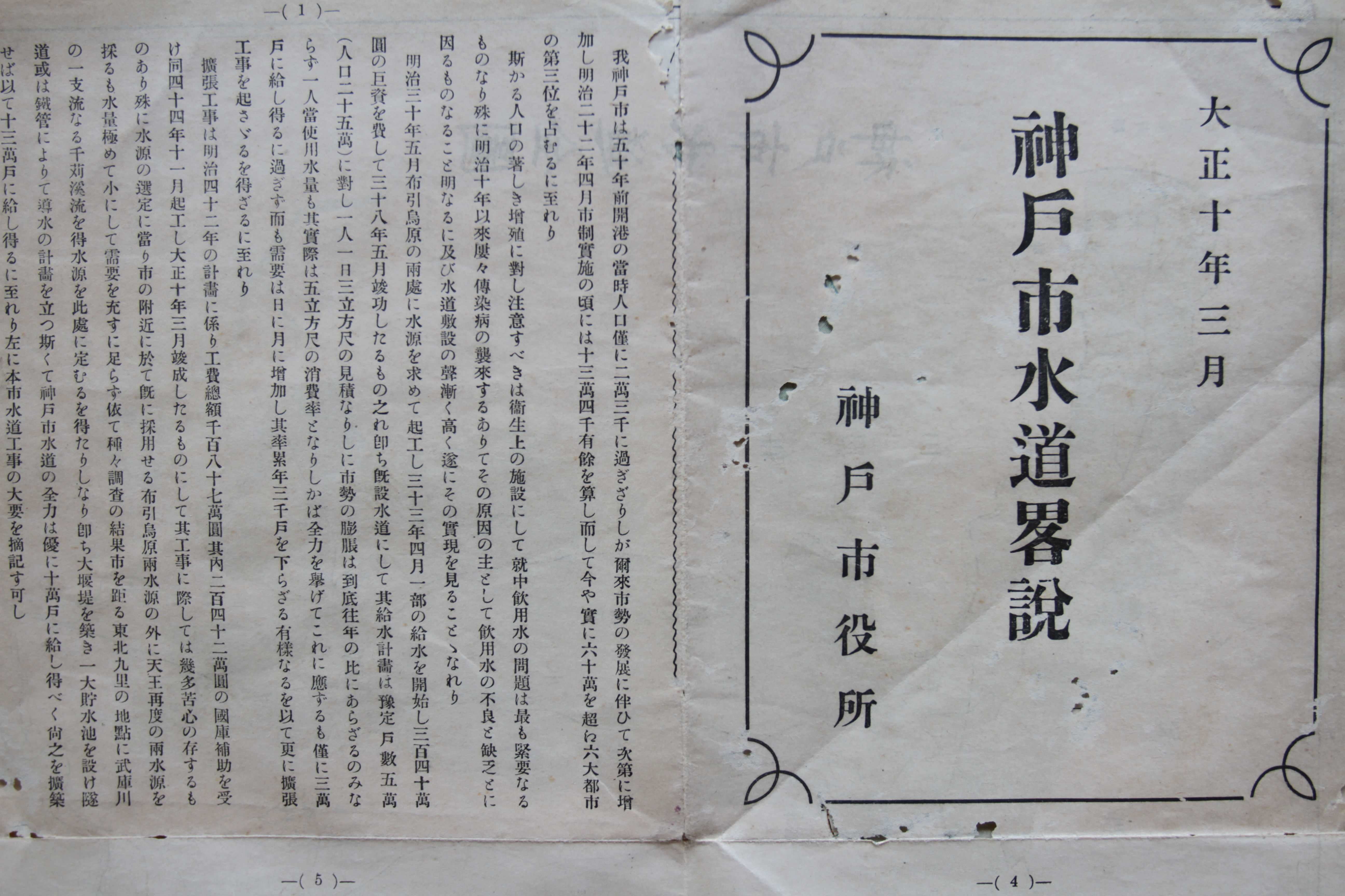 神戸水道畧説 神戸市役所 大正13年